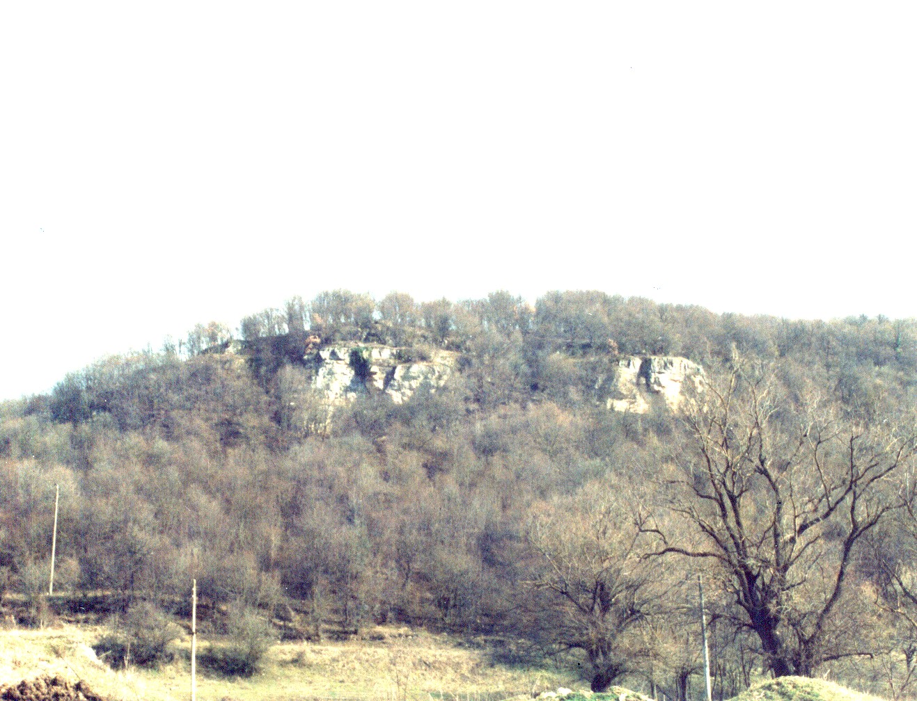 Хълмът, върху който се намират руините на "крепостта на духовете". Село Крепча, България